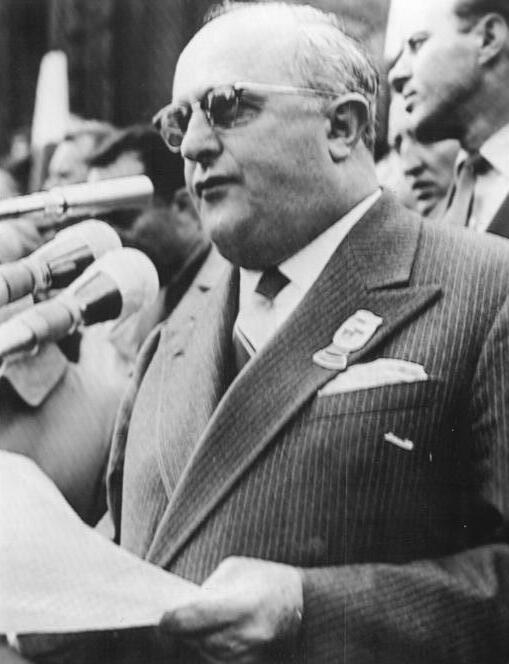 Friedensfahrt, Eröffnung, Rodoni Zentralbild Wendorf 2.5.1960 Telefoto - XIII. Internationale Friedensfahrt gestartet. Am ehrwürdigen Altstädter Ring in Prag wurde am 2.5.1960 vormittag 10.44 Uhr in Anwesenheit des UCI-Präsidenten Rodoni (Italien) und Tausender Zuschauer durch den DDR-Botschafter in der CSR, Georg Stibi, der Ehrenstart zur XIII. Internationalen Friedensfahrt Prag - Warschau - Berlin über 2 268 km freigegeben. 119 Fahrer aus 20 Ländern nahmen anschließend bei kühlem und windigem Wetter nach Aufhebung der Neutralisation an der Stadtgrenze das Rennen auf der ersten und mit 220 km zugleich längsten Etappe von Prag nach Brno auf. UBz: Der Präsident des Internationalen Radsport-Verbandes, Rodoni, spricht zur Verabschiedung der Fahrer.